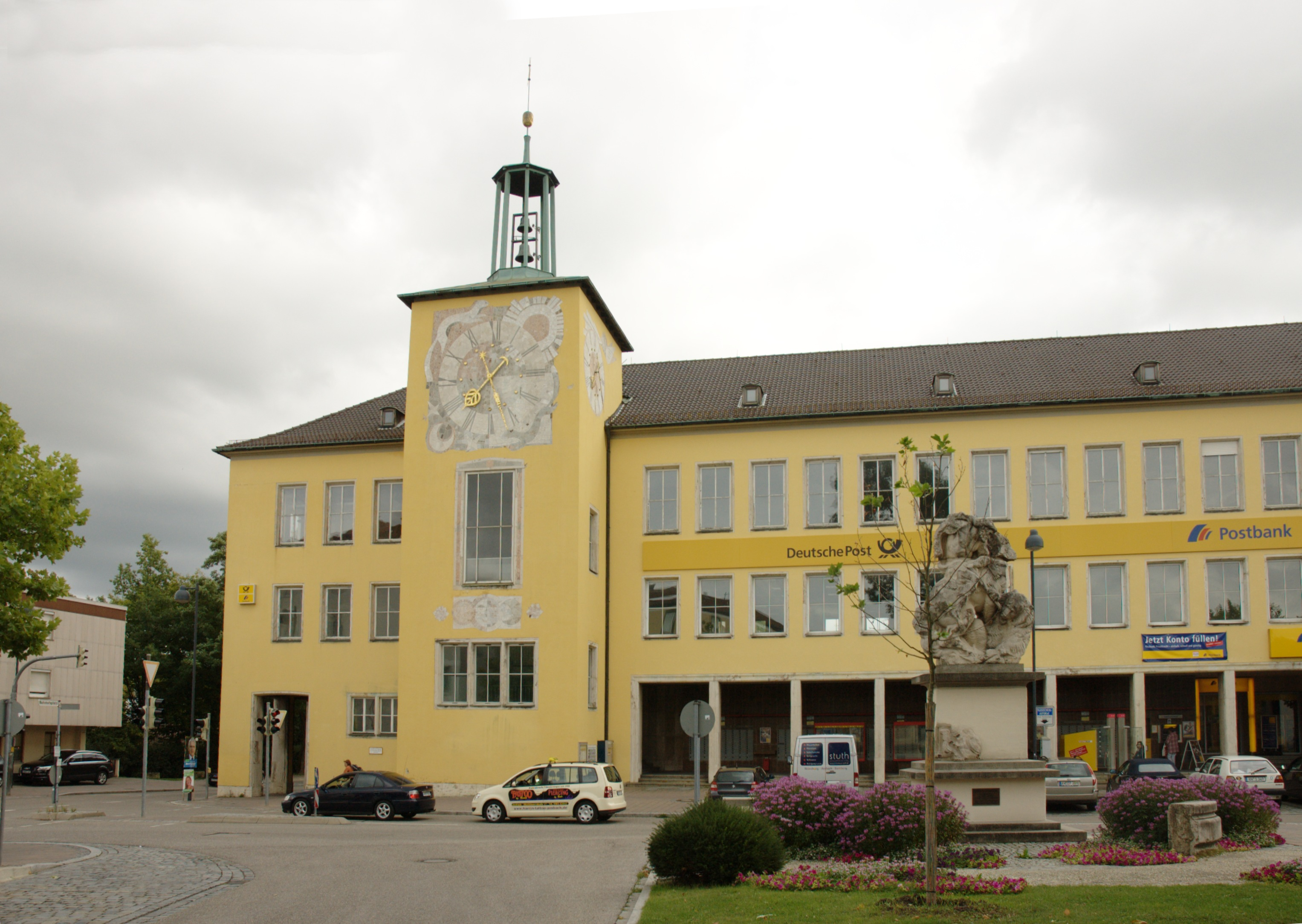 Ansbach, Hauptpoststelle